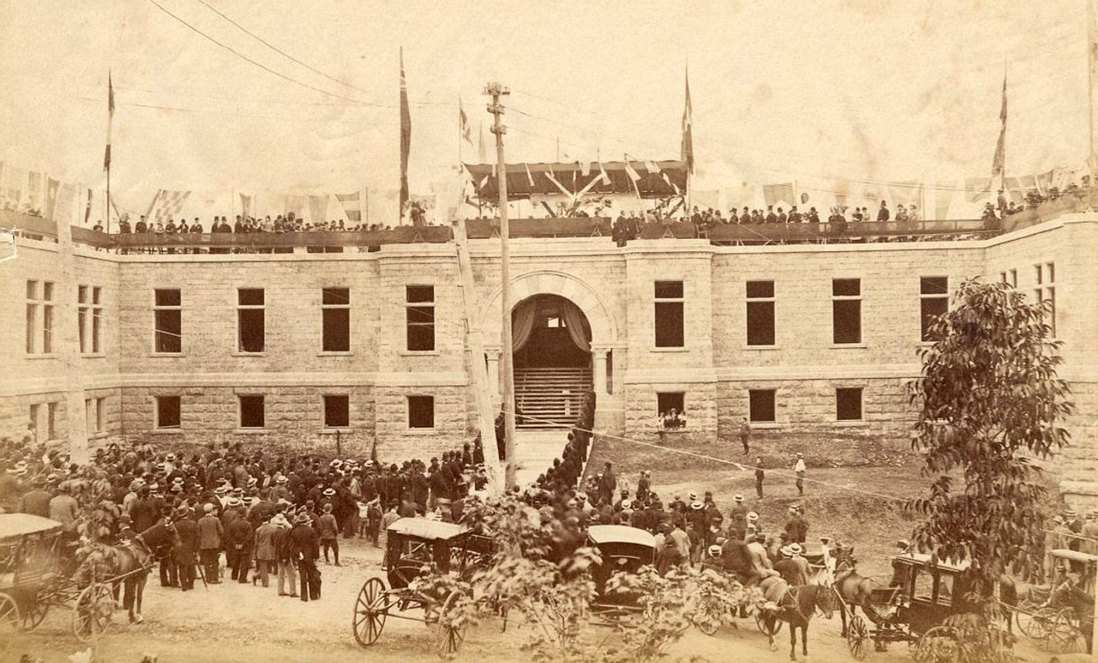 Vue de la célébration entourant la pose de la pierre angulaire du nouvel hôtel de ville de Québec en 1895. « Actuellement, une bonne partie de l’hôtel de ville de Québec est recouverte d’échafaudages. On s’active au rejointoiement des pierres. À cette occasion, trouvera-t-on la pierre angulaire de l’édifice? Et qui sait, une capsule temporelle comme on en a trouvée récemment dans les monuments de Champlain et de Wolfe-Montcalm? La pierre a été posée le 15 août 1895 par le maire Parent lors d’une grande cérémonie. – avec Estrade des dignitaires. » – Société historique de Québec